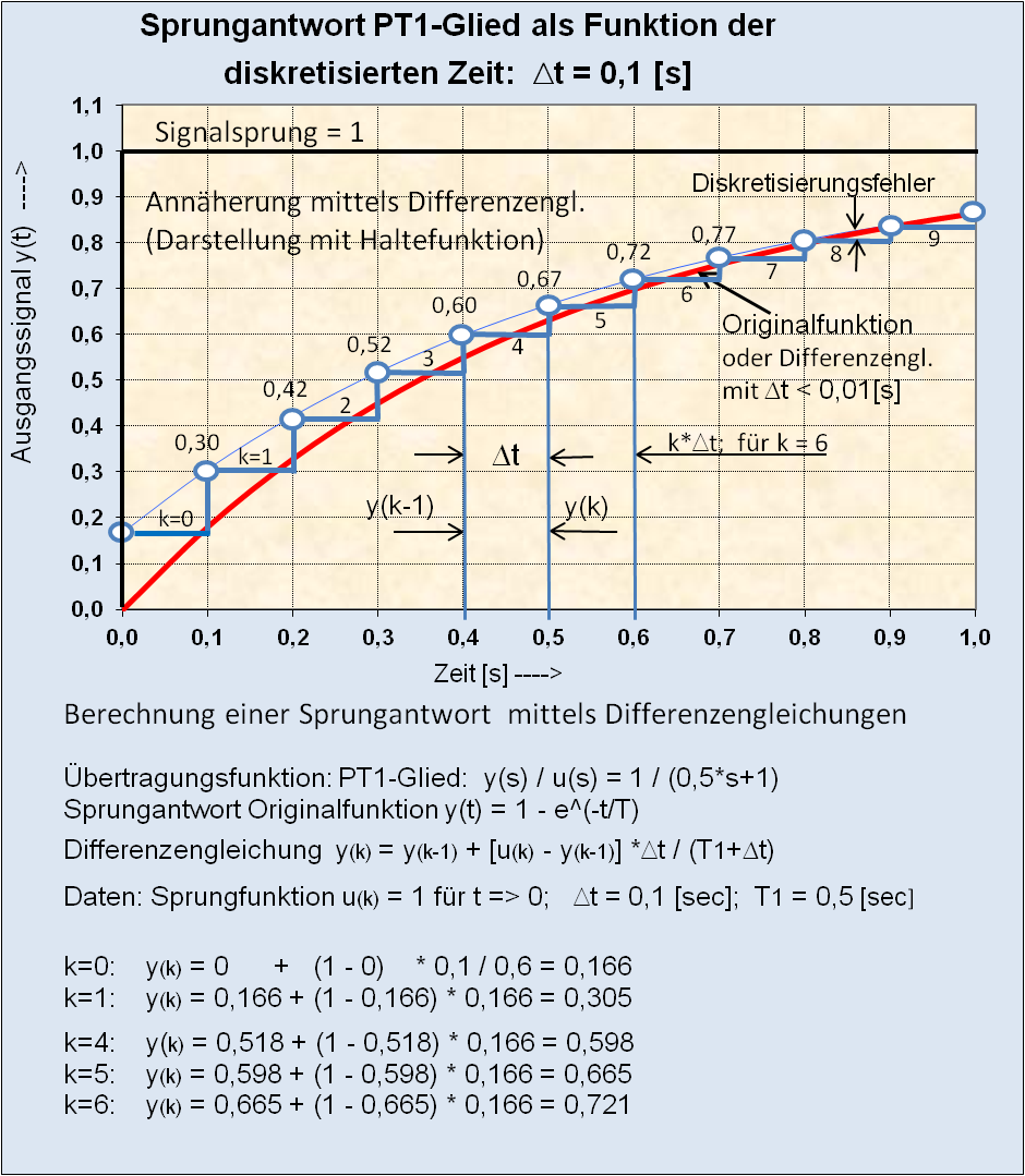 Rechteck-Approximation eines PT1-Gliedes mit diskretisierter Zeit